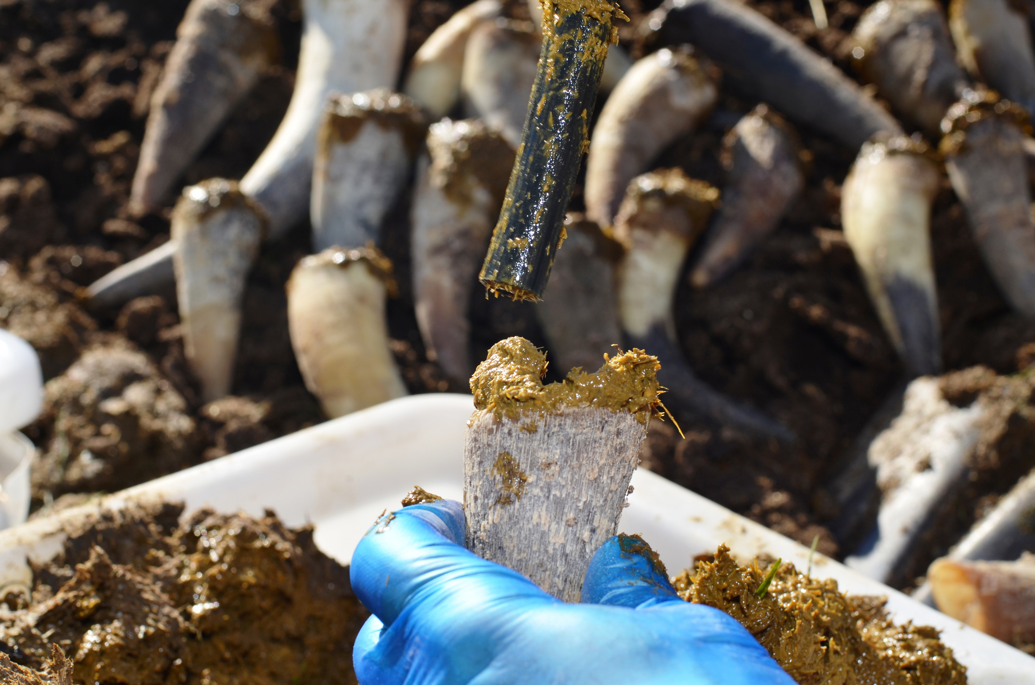 Remplissage de cornes de vache avec de la bouse